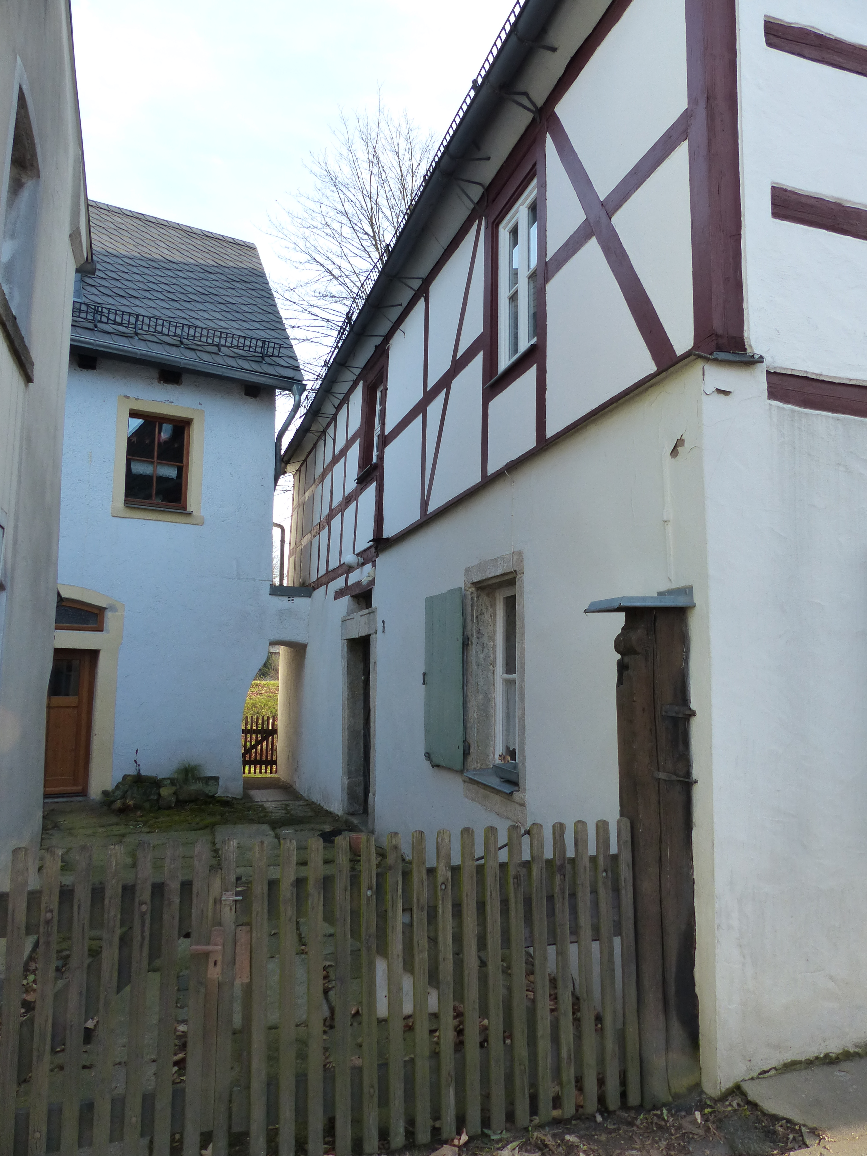 Färberstraße 7, Wohnhaus des Malers Anton Richter